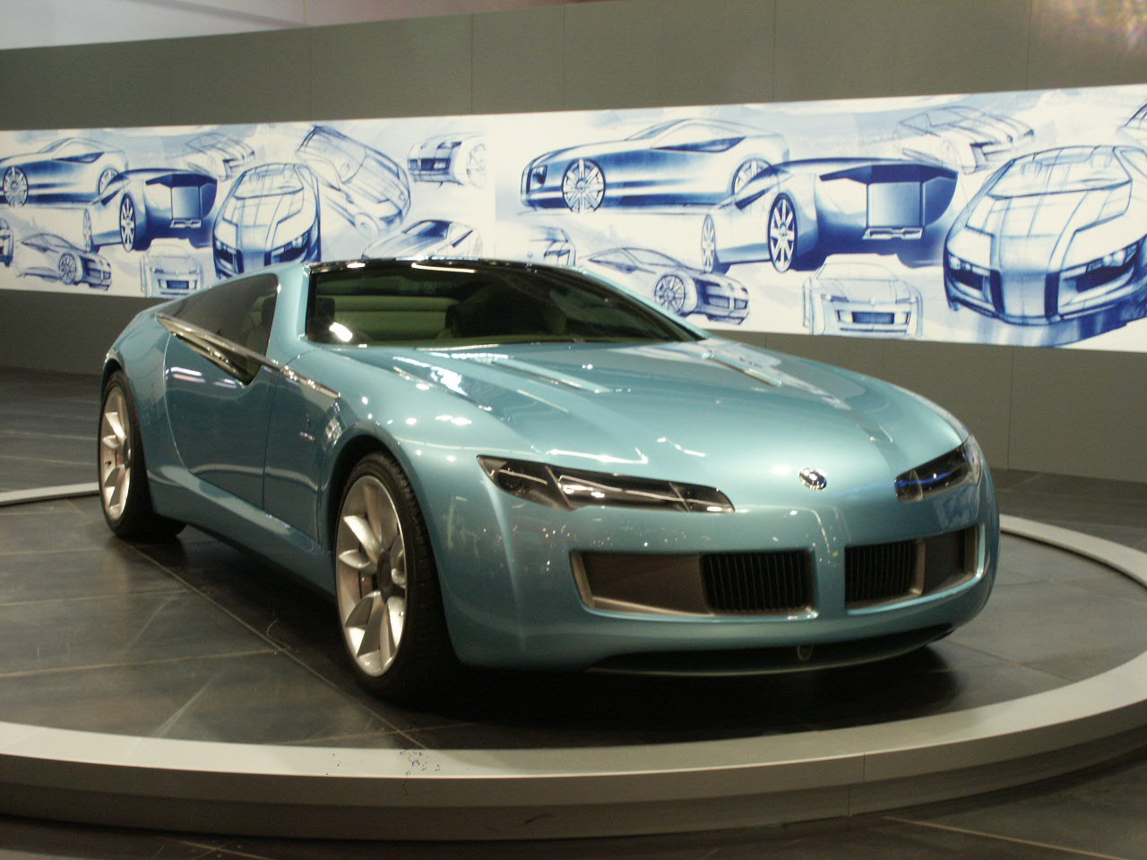 Quelle: selbst fotografiert, IAA 09/2003 Fotograf: Späth Chr.